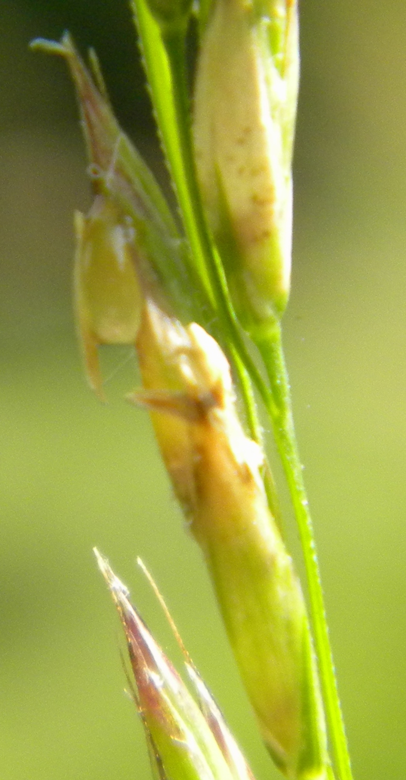 Miellat sur fétuque élevée